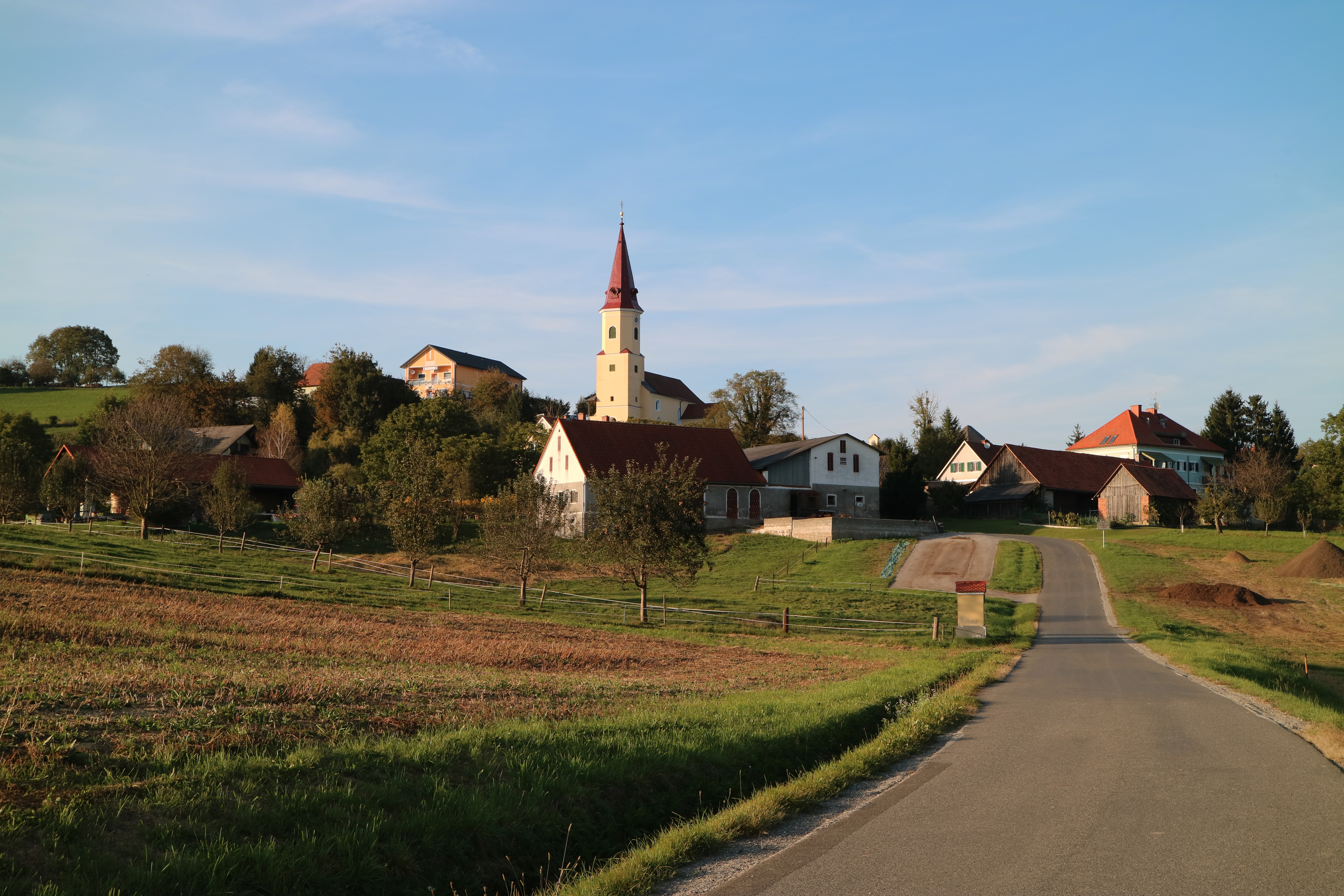 St. Ulrich am Waasen (Steiermark), Ansicht von Süden